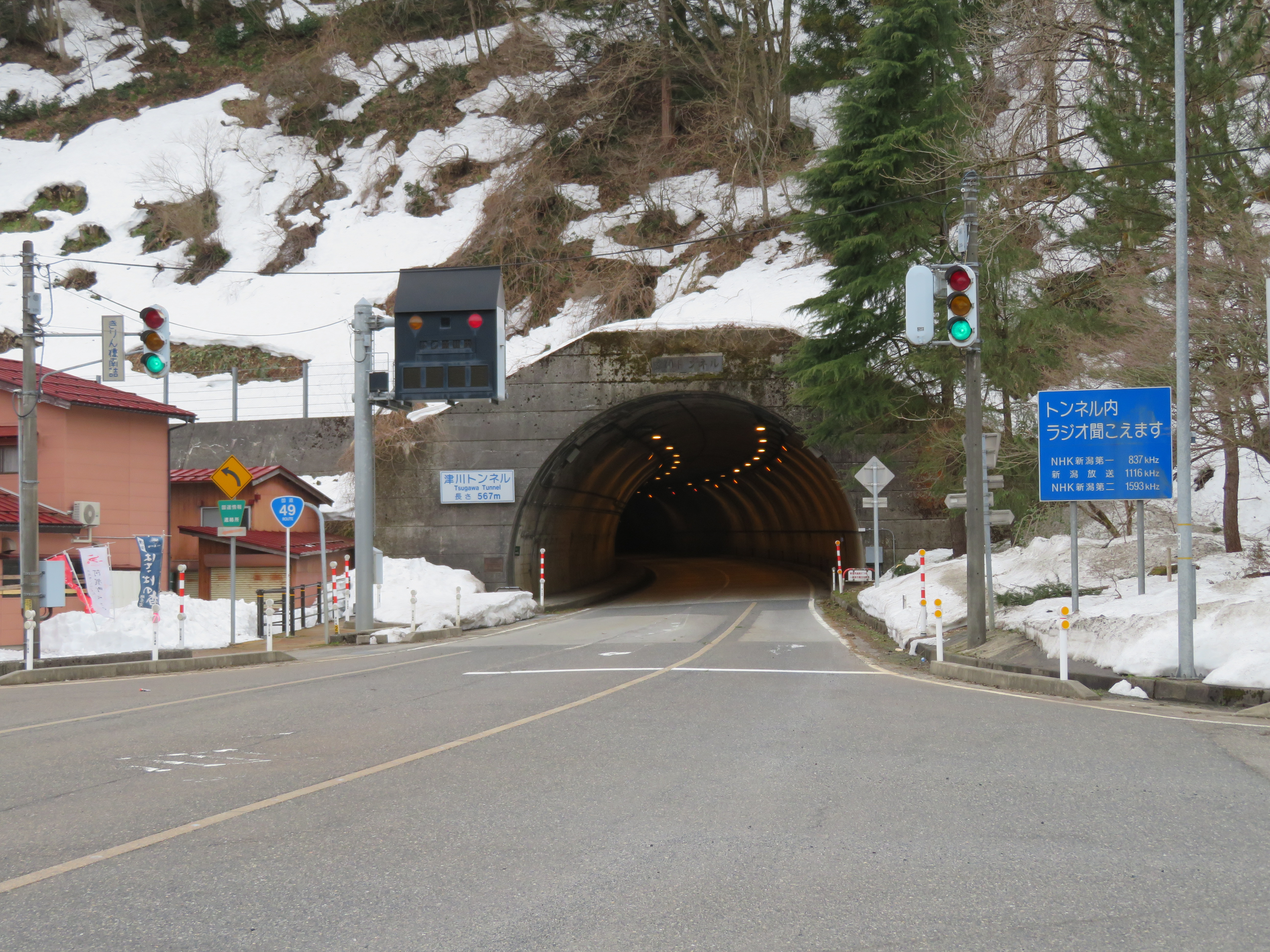 国道49号線津川トンネル（きりん橋南交差点付近側）